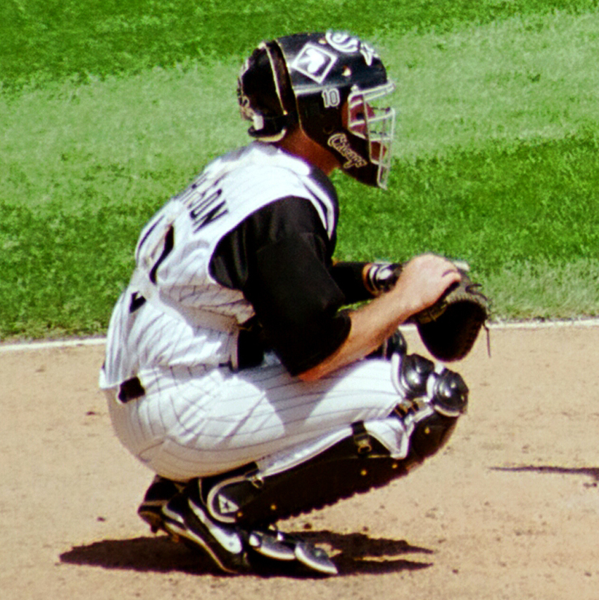 Derek Jeter bats at New Comiskey Park, 1999.